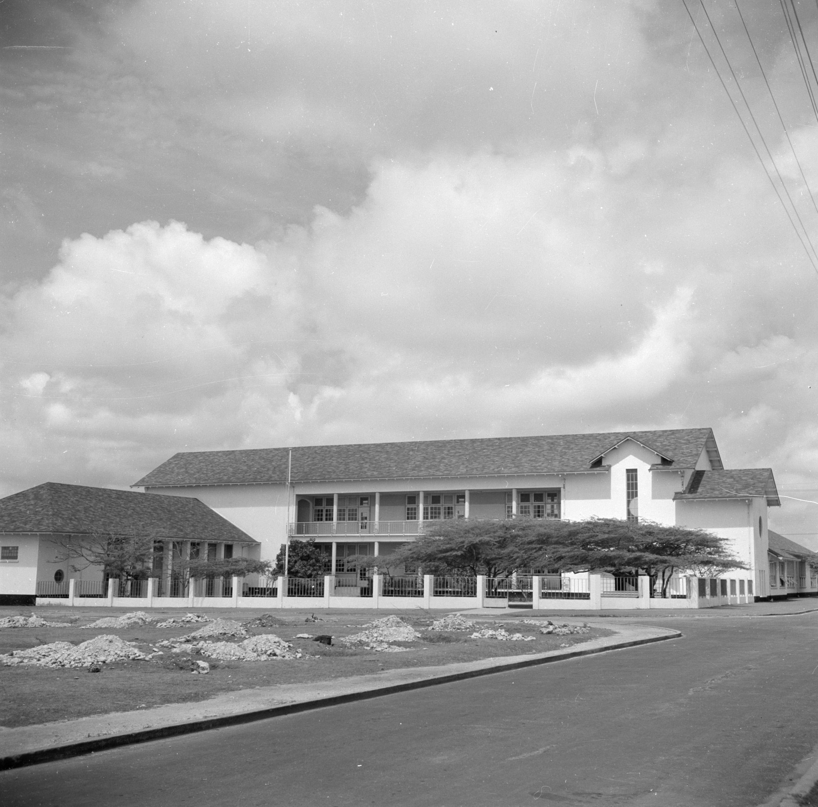 Collectie / Archief : Fotocollectie Van de Poll Reportage / Serie : Reis naar Suriname en de Nederlandse Antillen Beschrijving : De Julianaschool in Oranjestad op Aruba Datum : 1947 Locatie : Aruba, Oranjestad Trefwoorden : scholen Fotograaf : Poll, Willem van de, [onbekend] Auteursrechthebbende : Nationaal Archief Materiaalsoort : Negatief (zwart/wit) Nummer archiefinventaris : bekijk toegang 2.24.14.02 Bestanddeelnummer : 252-7880